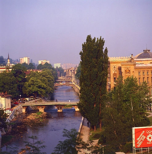 Sarajevo, Bosnia-Herzegovina